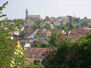 Ville de Beaucourt (Territoire de Belfort) vue générale Photo prise en juin 2004 par LP90 Licence GFDL LP90 juin 2004